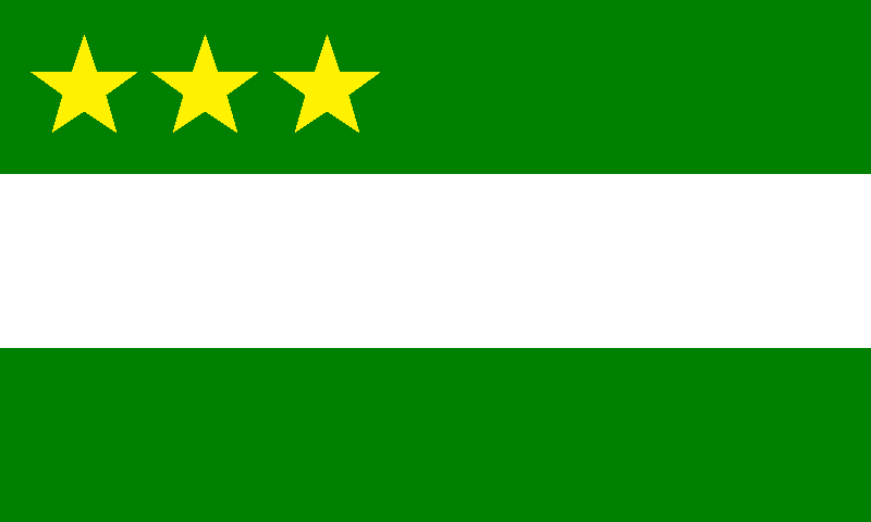 Bandera de Las Lajas